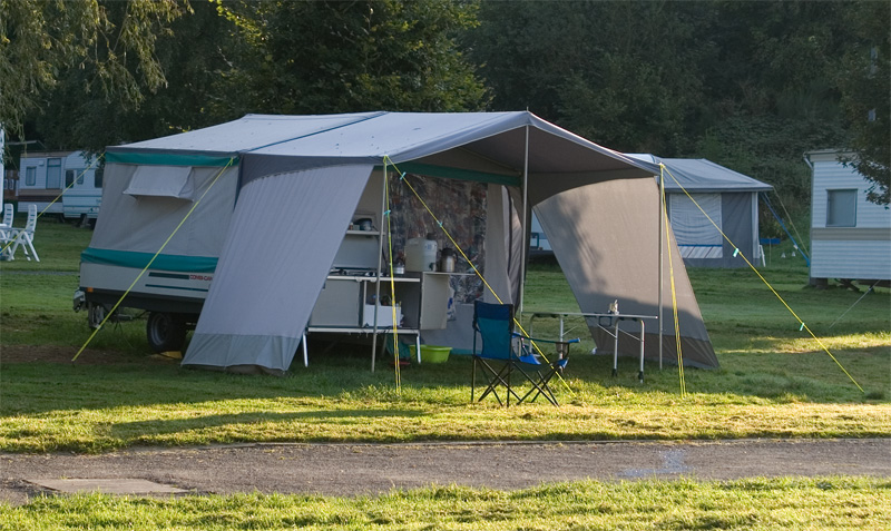 Vouwwagen